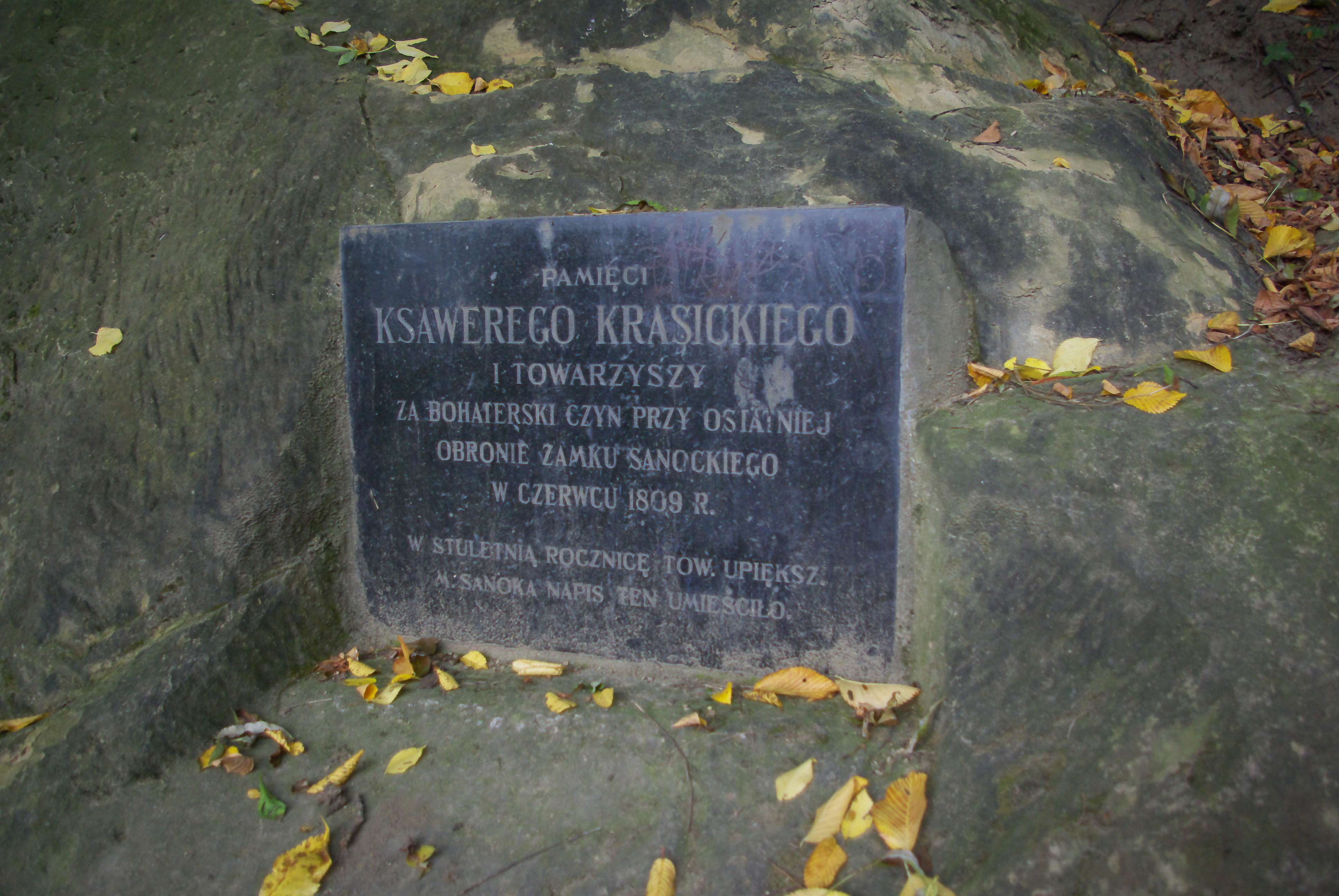 Tablica pamiątkowa w skale pamięci Ksawerego Krasickiego przy Schodach Zamkowych w Sanoku